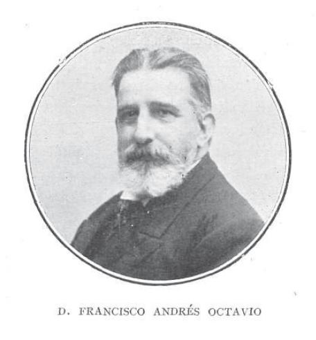 Imagen tomada con cámara de la Revista Municipal, Nº 31 de diciembre de 1908